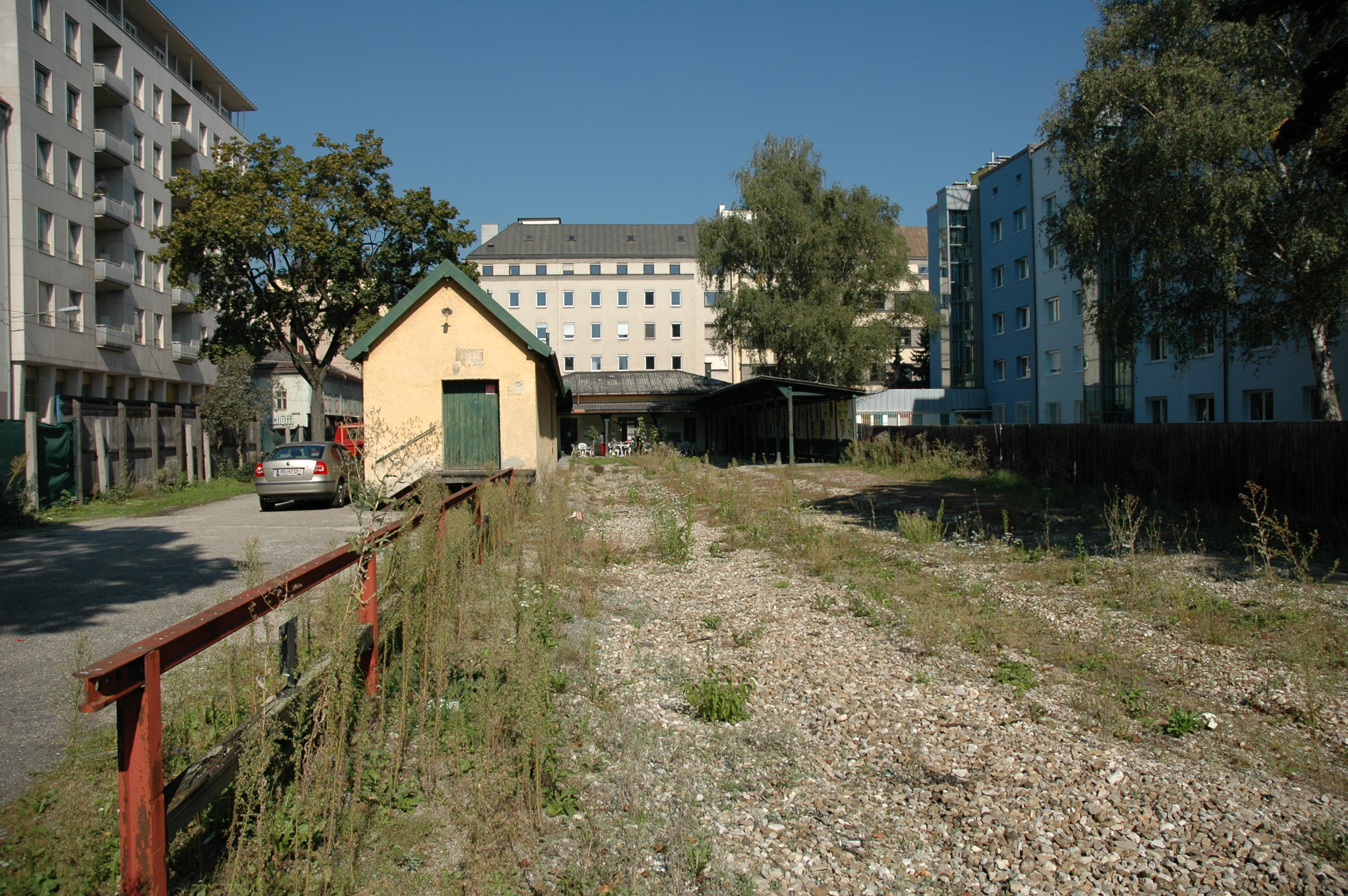 Ehemaliger Bahnhof der Linzer Lokalbahn (LiLo) in der Coulinstraße - die Gleise wurden bereits entfernt